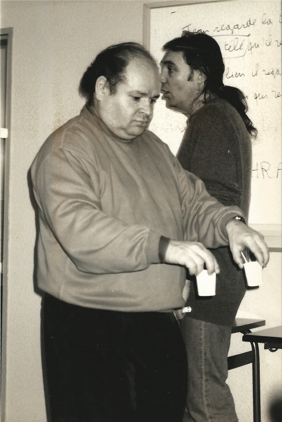 Guy Bouchauveau et Christian Cuxac; premier cours de linguistique aux sourds adultes à INJS Paris, 1992-1993. Photo dans l'année 1992-1993.